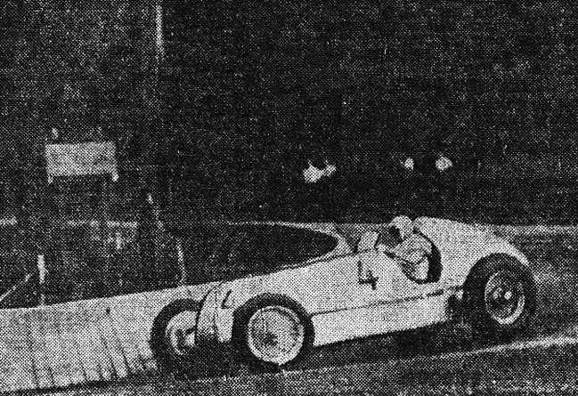 Rudolf Caracciola, vainqueur du Grand Prix de Belgique 1935